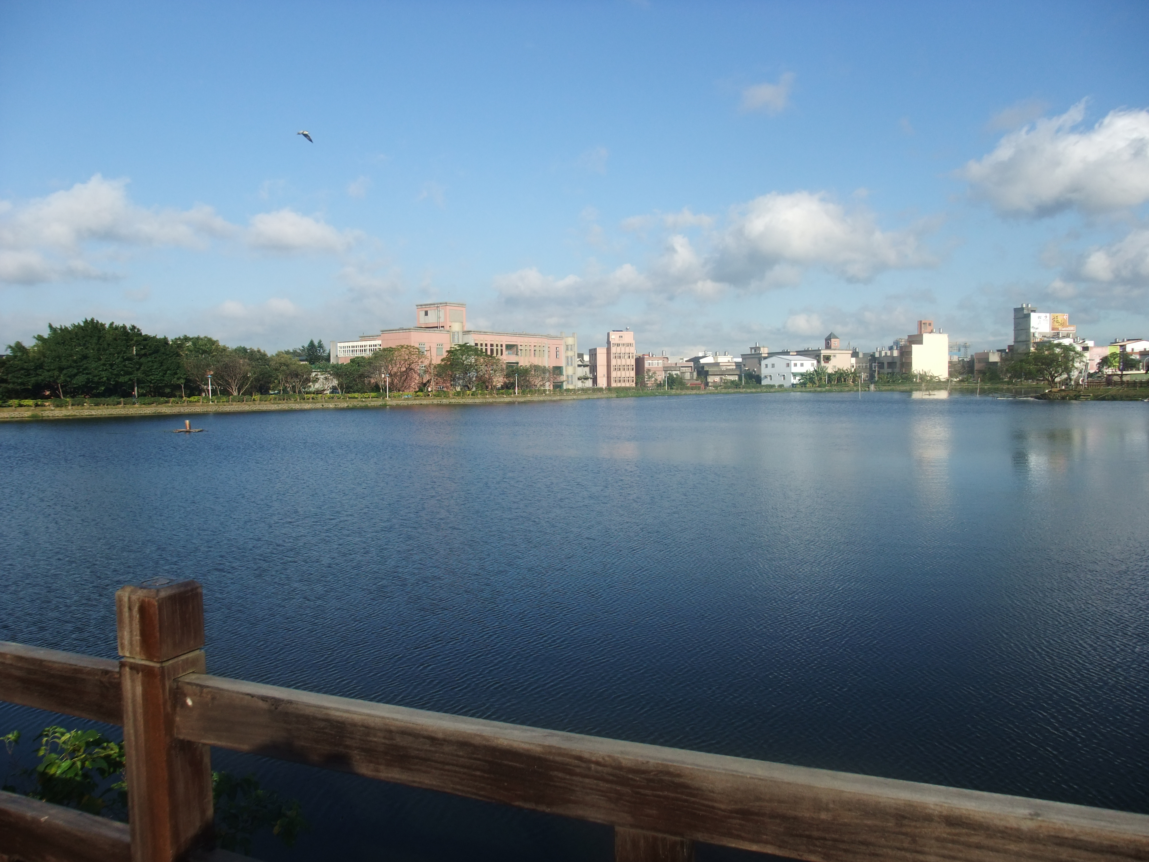 中文（台灣）: 大竹觀光休閒公園